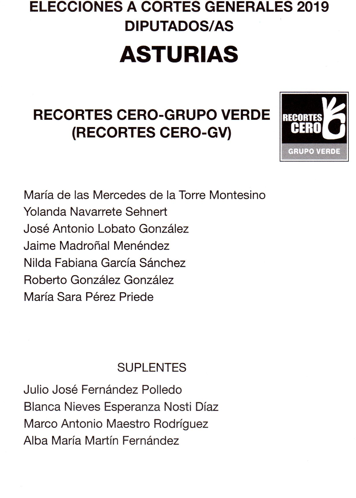 Papeleta electoral de Recortes Cero-Grupo Verde (RECORTES CERO-GV) para el Congreso - Elecciones Generales de España de 2019, circunscripción de Asturias.